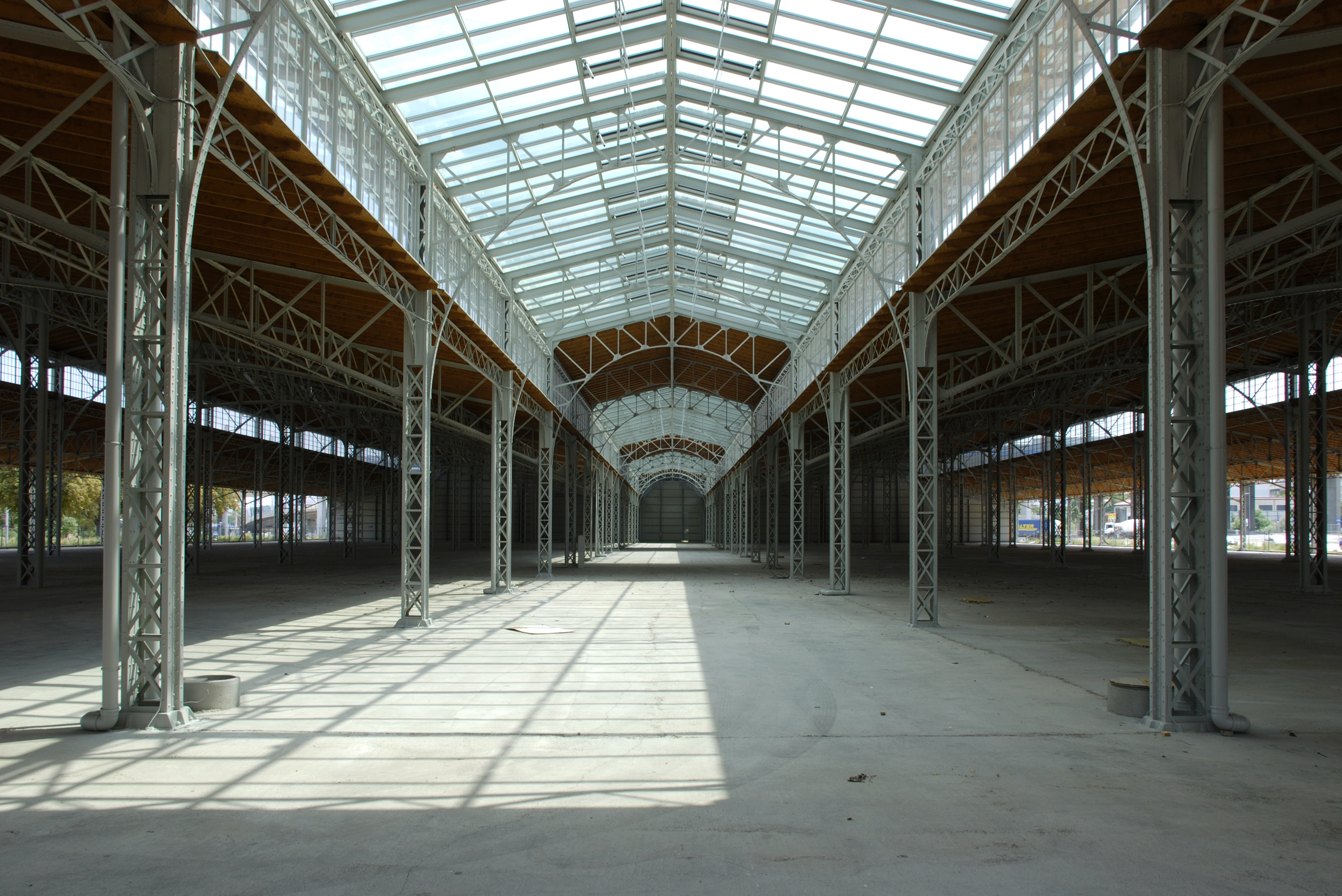 Viehmarktgasse 5-7, 1030 Wien, Zentral-Viehmarkt St. Marx - Rinderhalle, nach Hüllensanierung 2006/2007